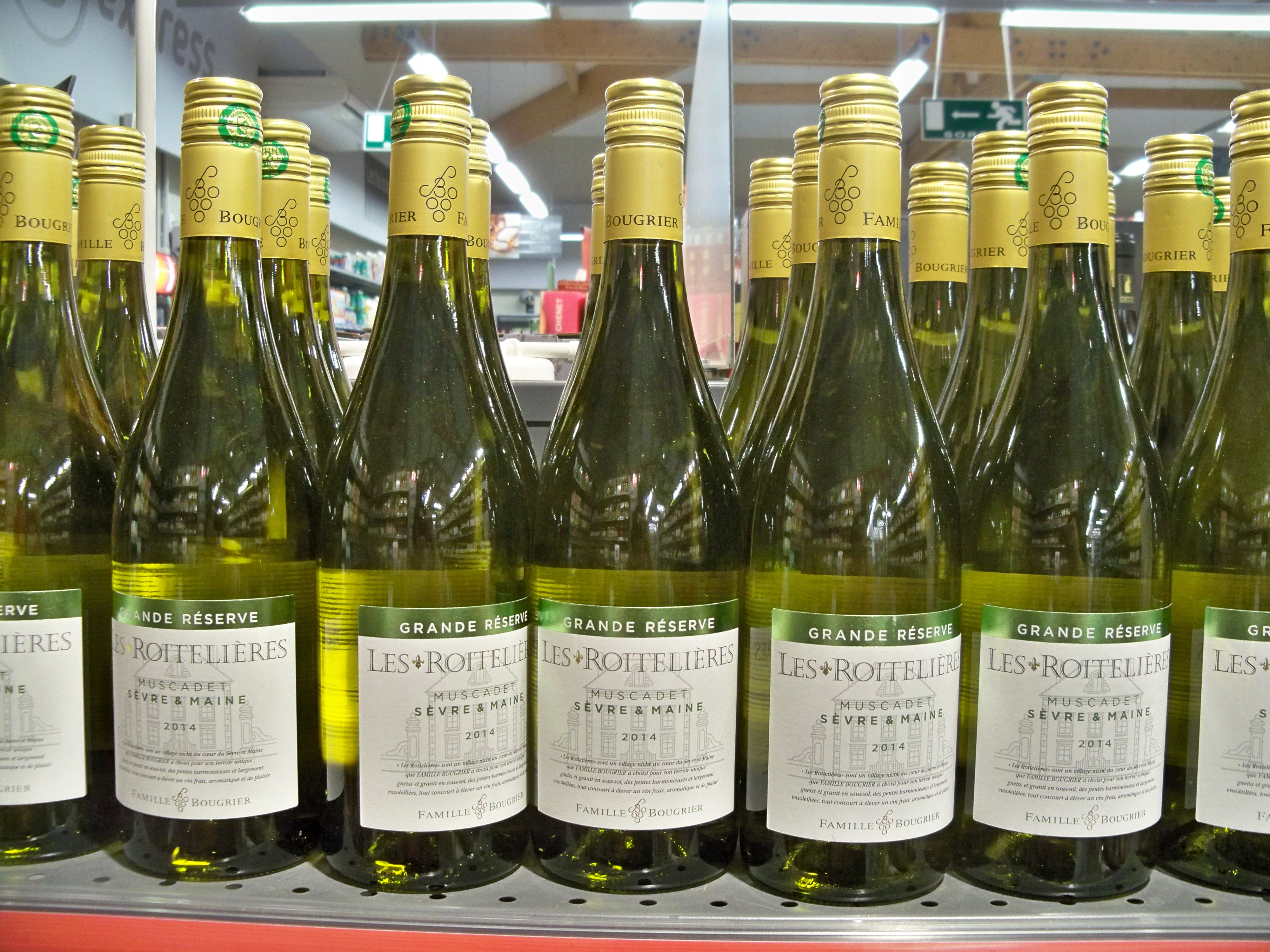 bouteilles de Muscadet Sèvre & Maine